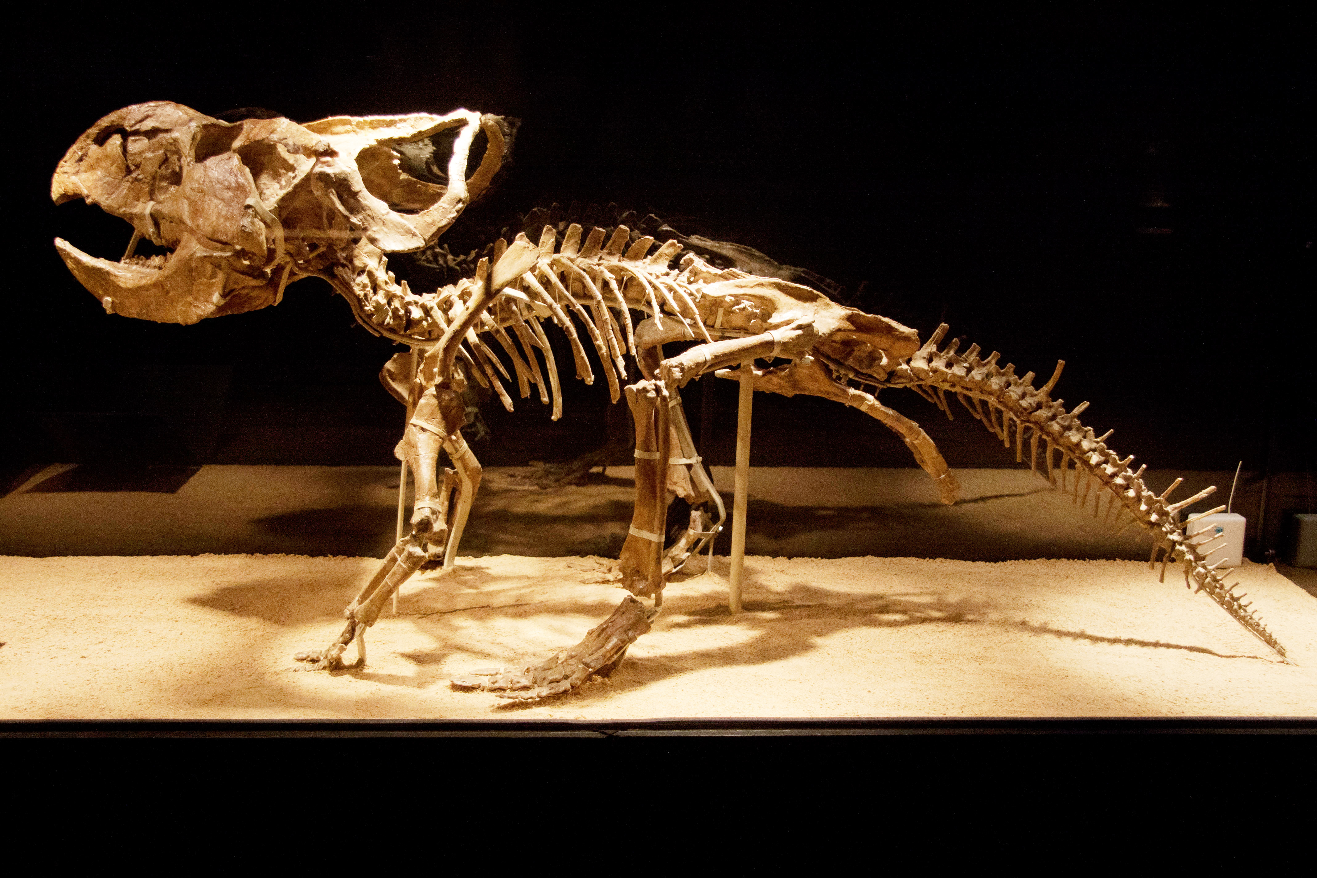 IMG_1237'